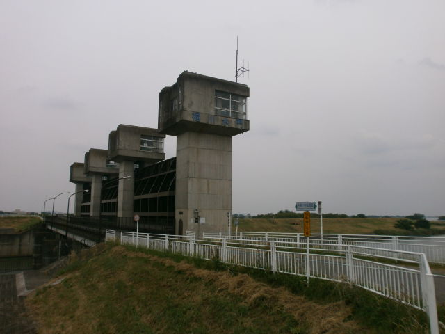 福川水門